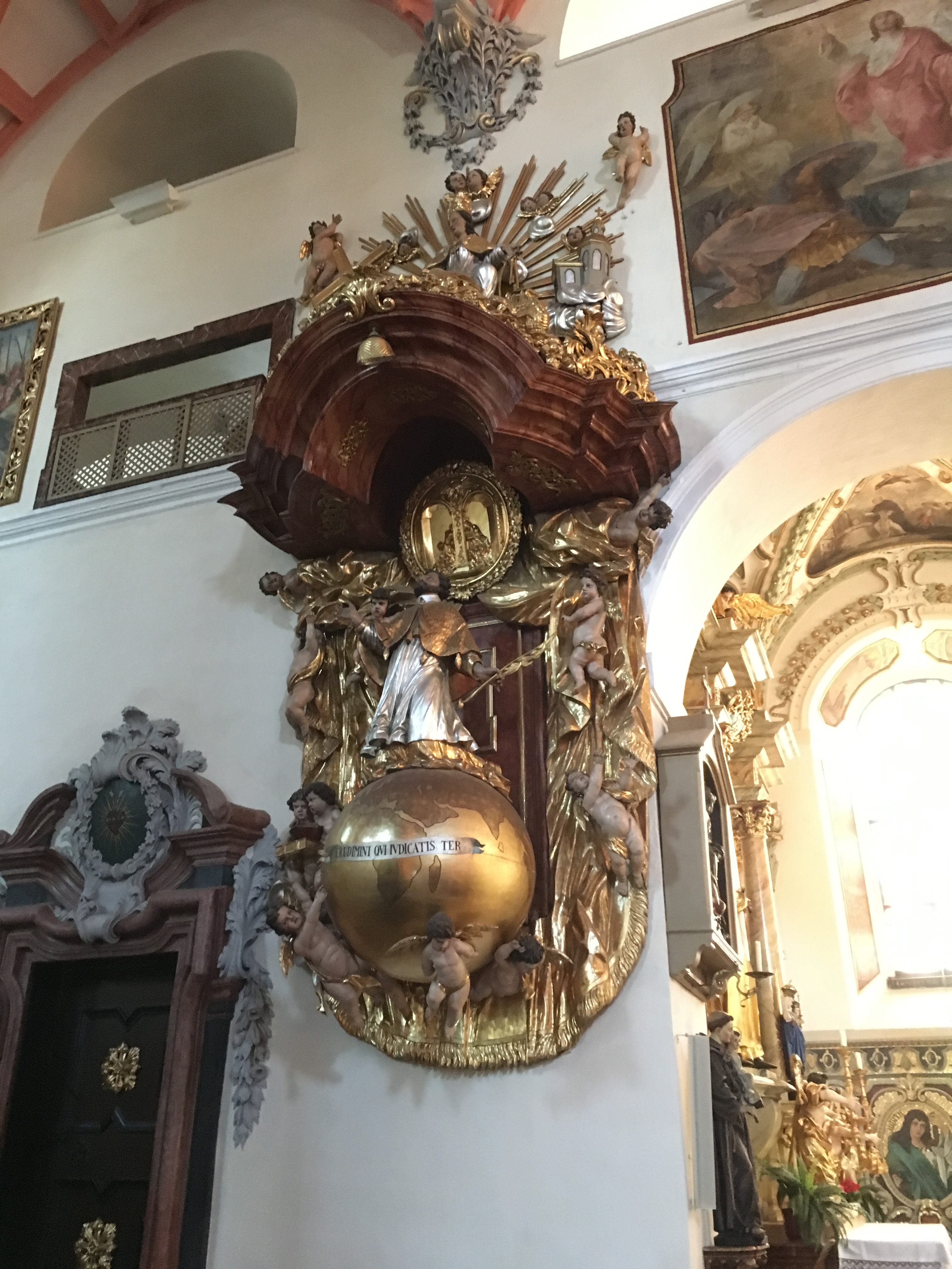 Nepomuk Scheibbs